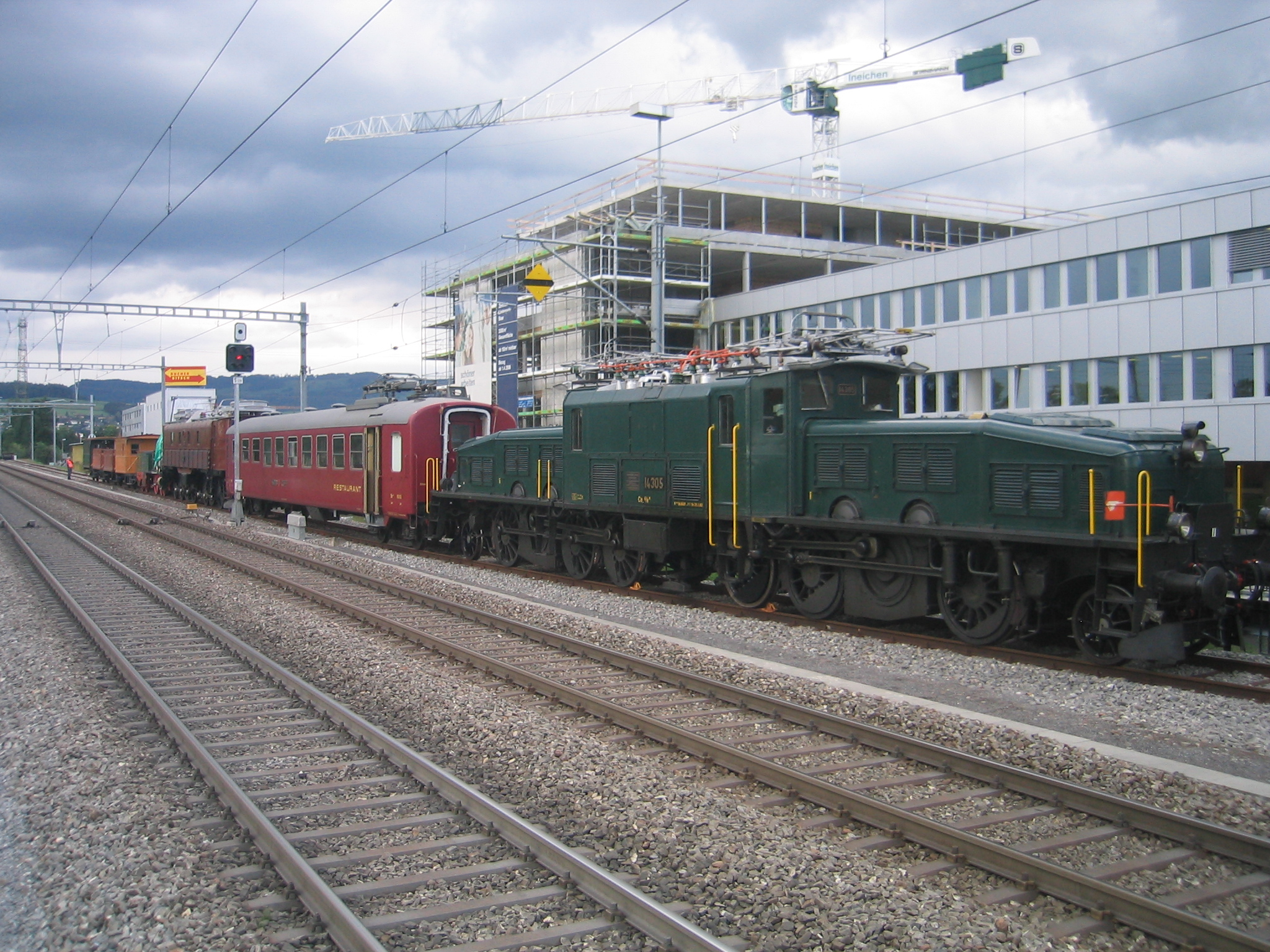 Historische Fahrzeuge im Abstellgeleise in Lindenpark Baar ZG/CH